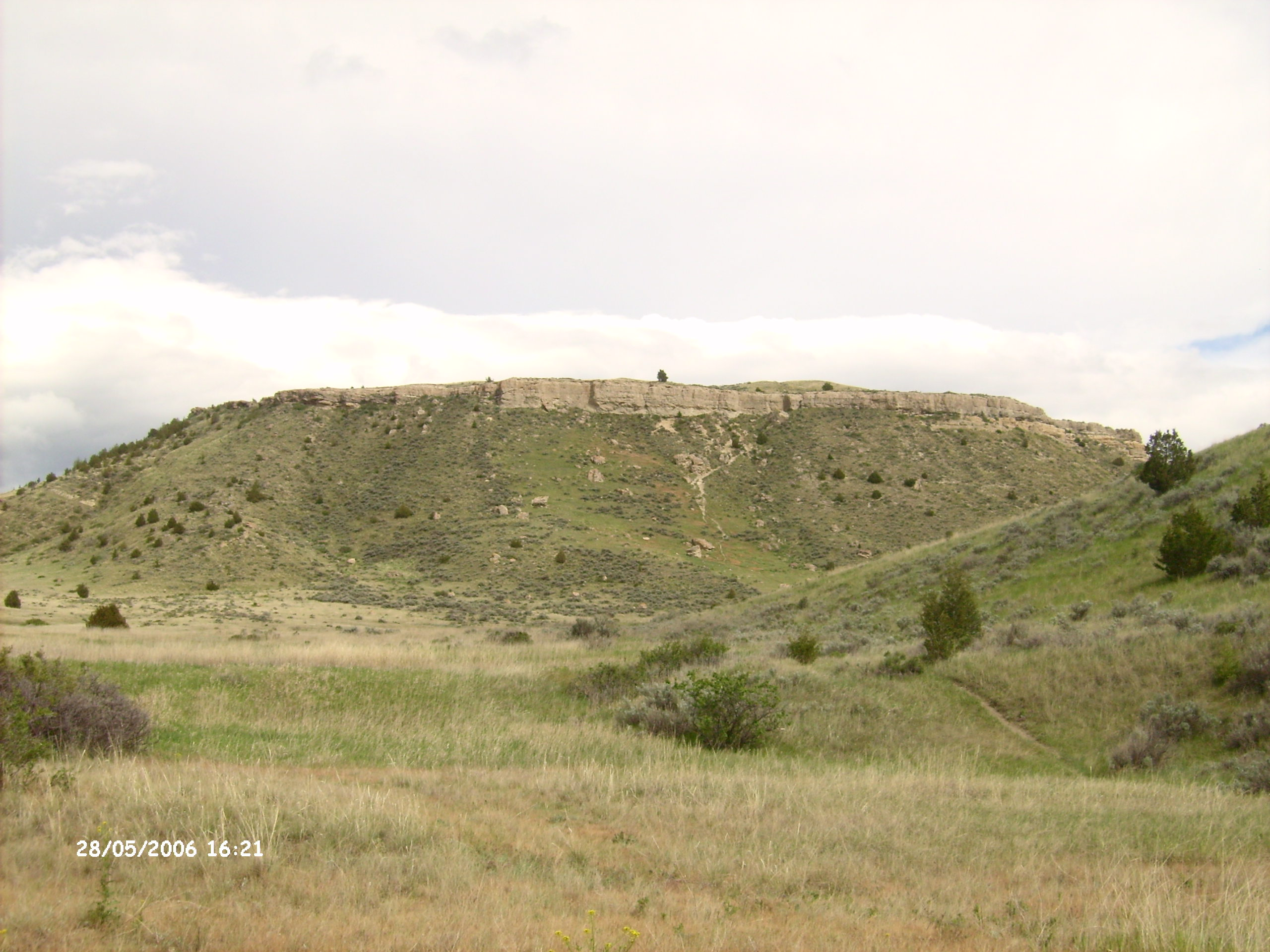 Madison Buffalo Jump, Montana, 2006-05-28